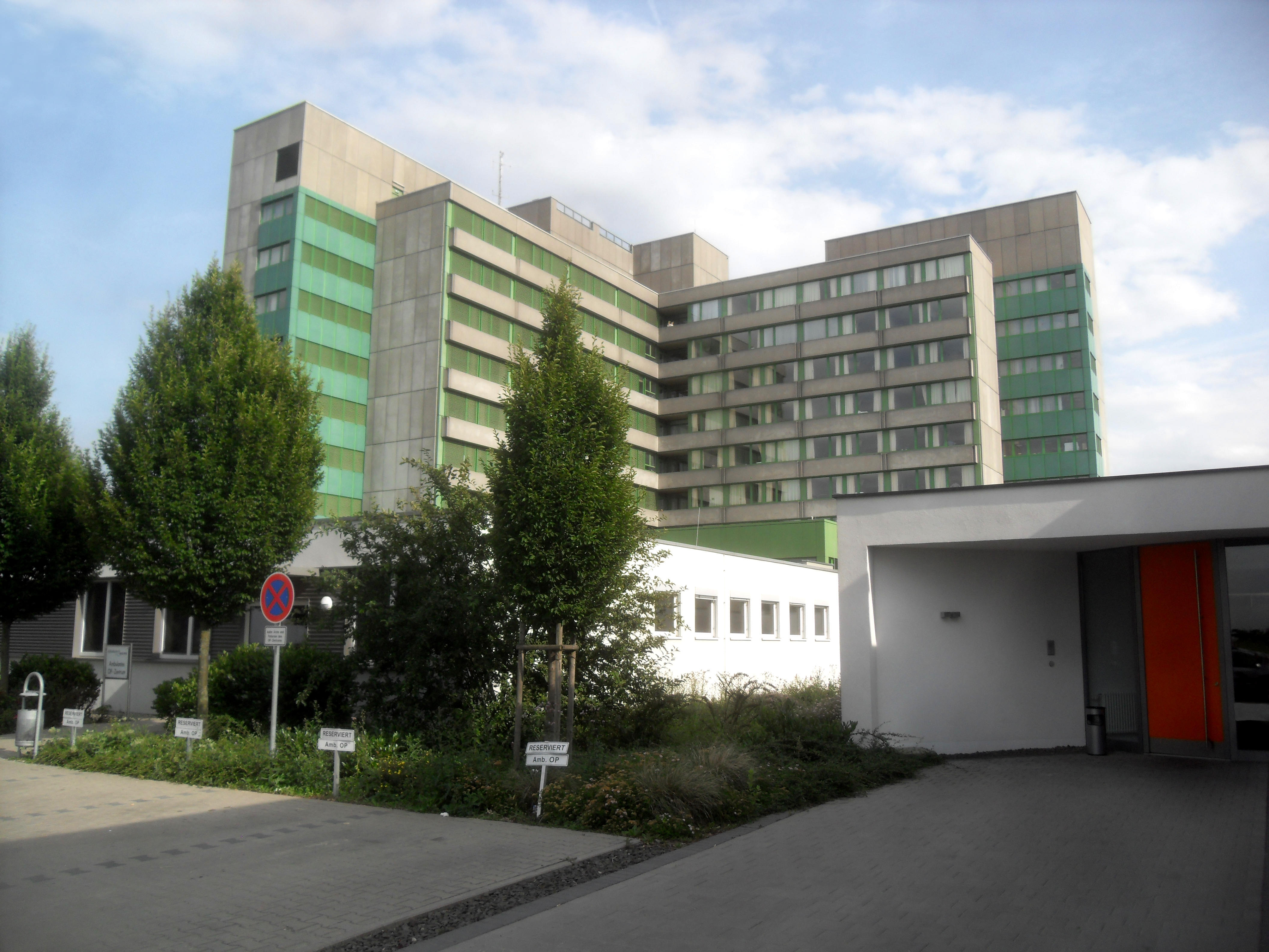 Das Hauptgebäude des Klinikums Worms in Rheinhessen in Rheinland-Pfalz (Deutschland)